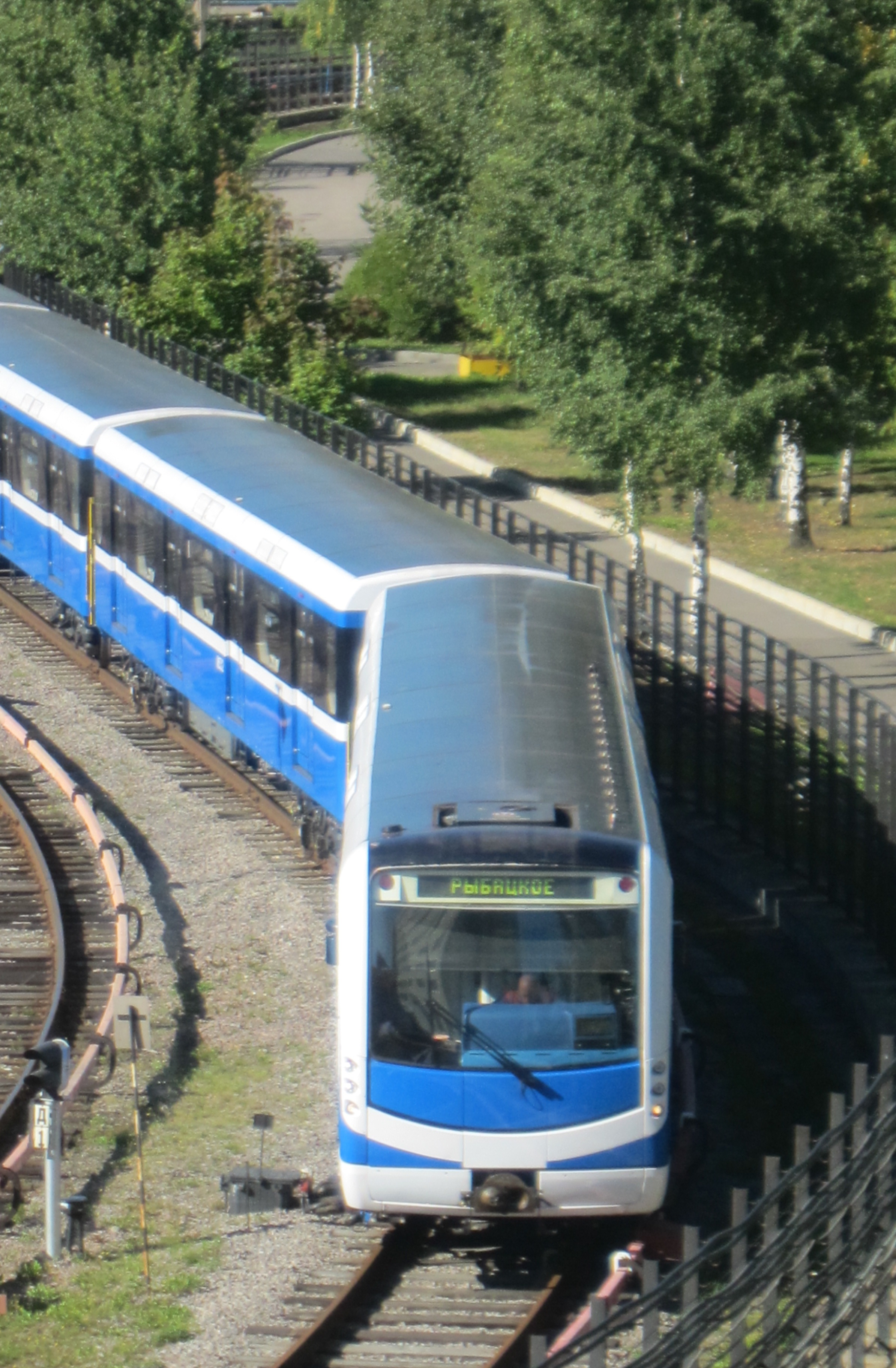 Состав метро НеВа на парковых путях